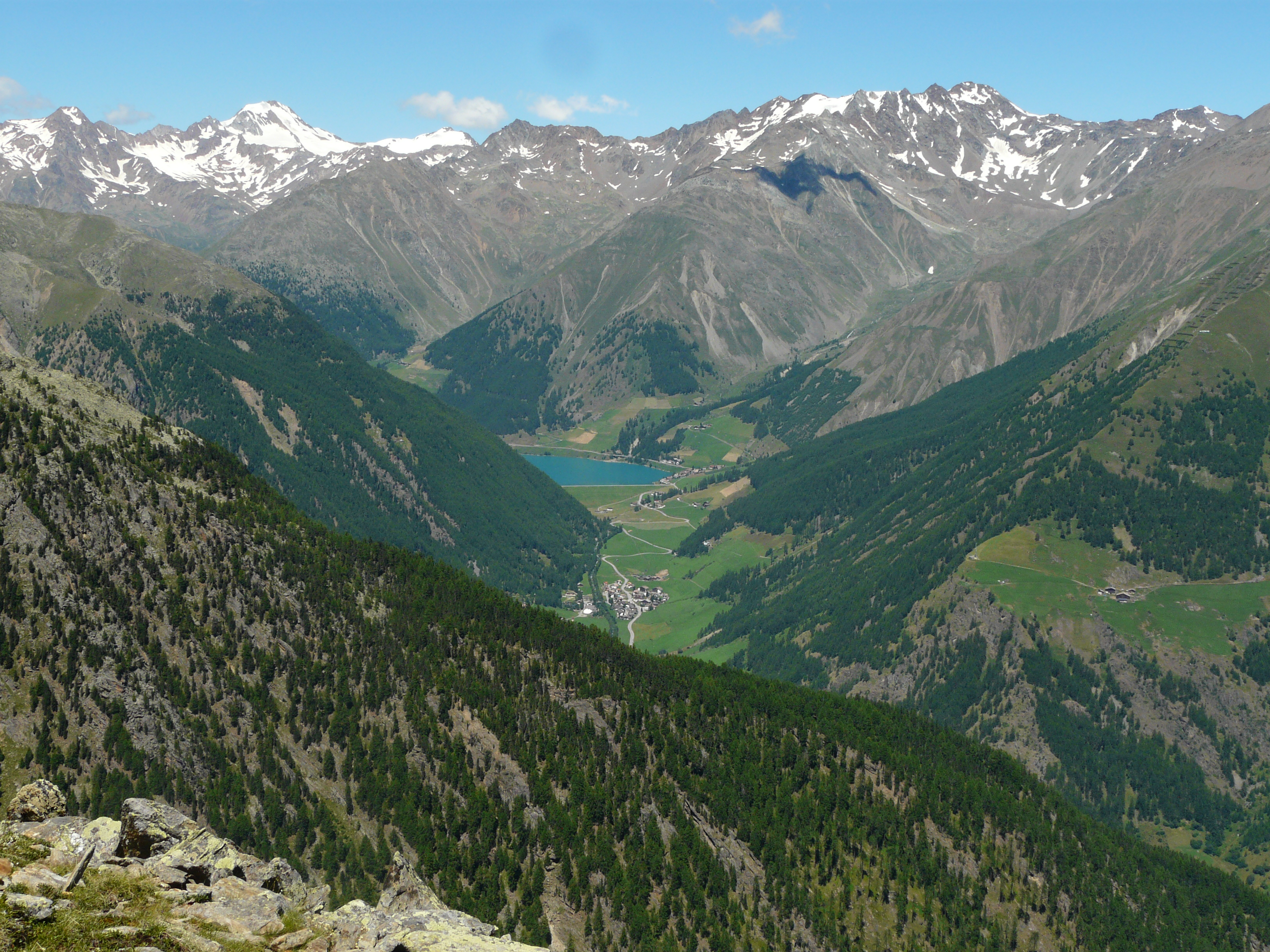 Blick von der Kreuzspitze ins Schnalstal: Unser Frau, Vernagtsee, dahinter Fineilspitze, Langtauferer Spitze, Weißkugel